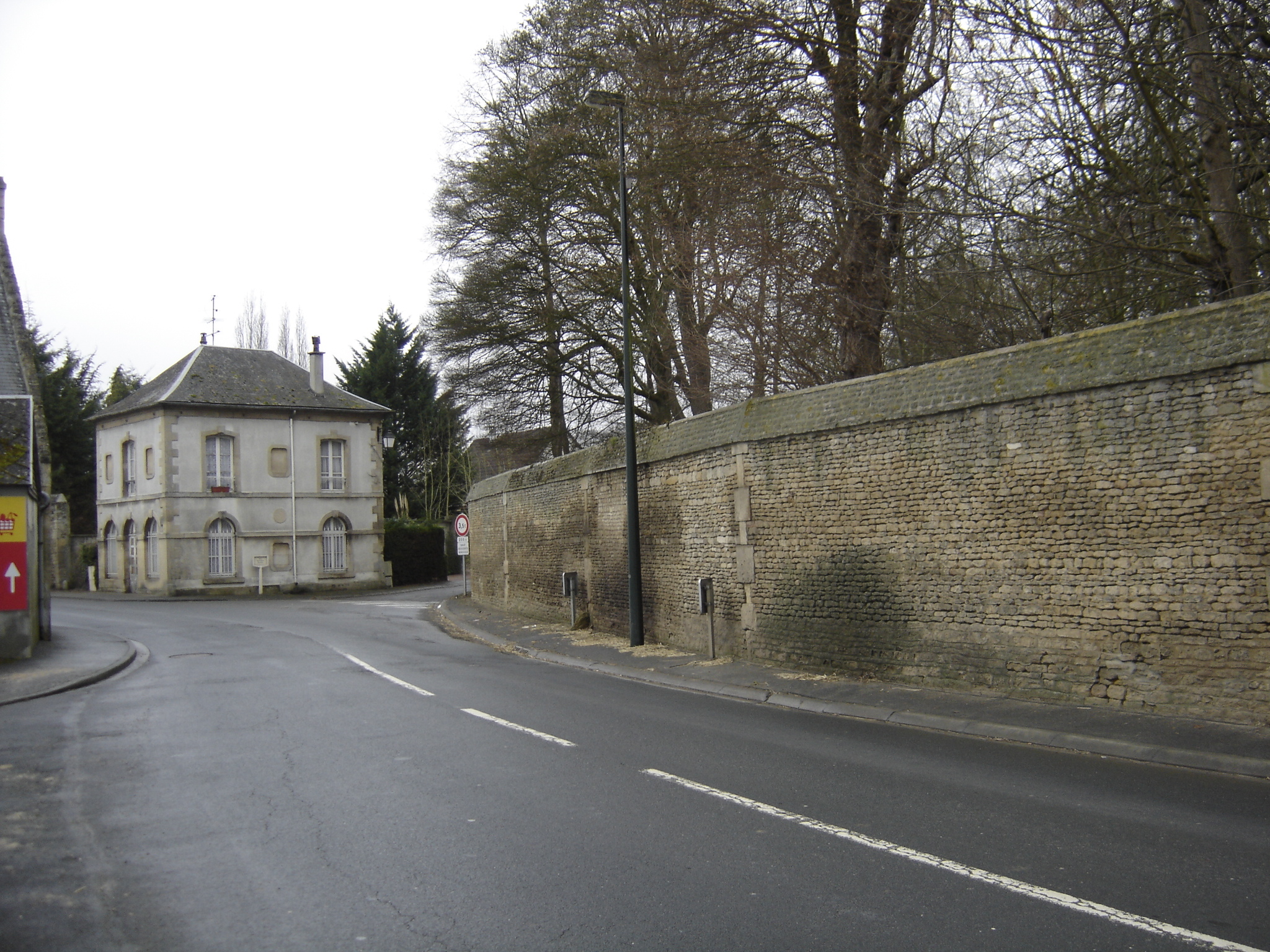 ancienne mairie de Biéville à Biéville Beuville